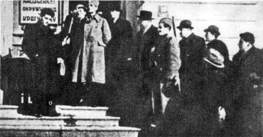 Srpskohrvatski / српскохрватски: Ljotićevac Sima Kerečki govori sa stepenica Kreisgericht-a u Kragujevcu, nakon nemačkog masakra.